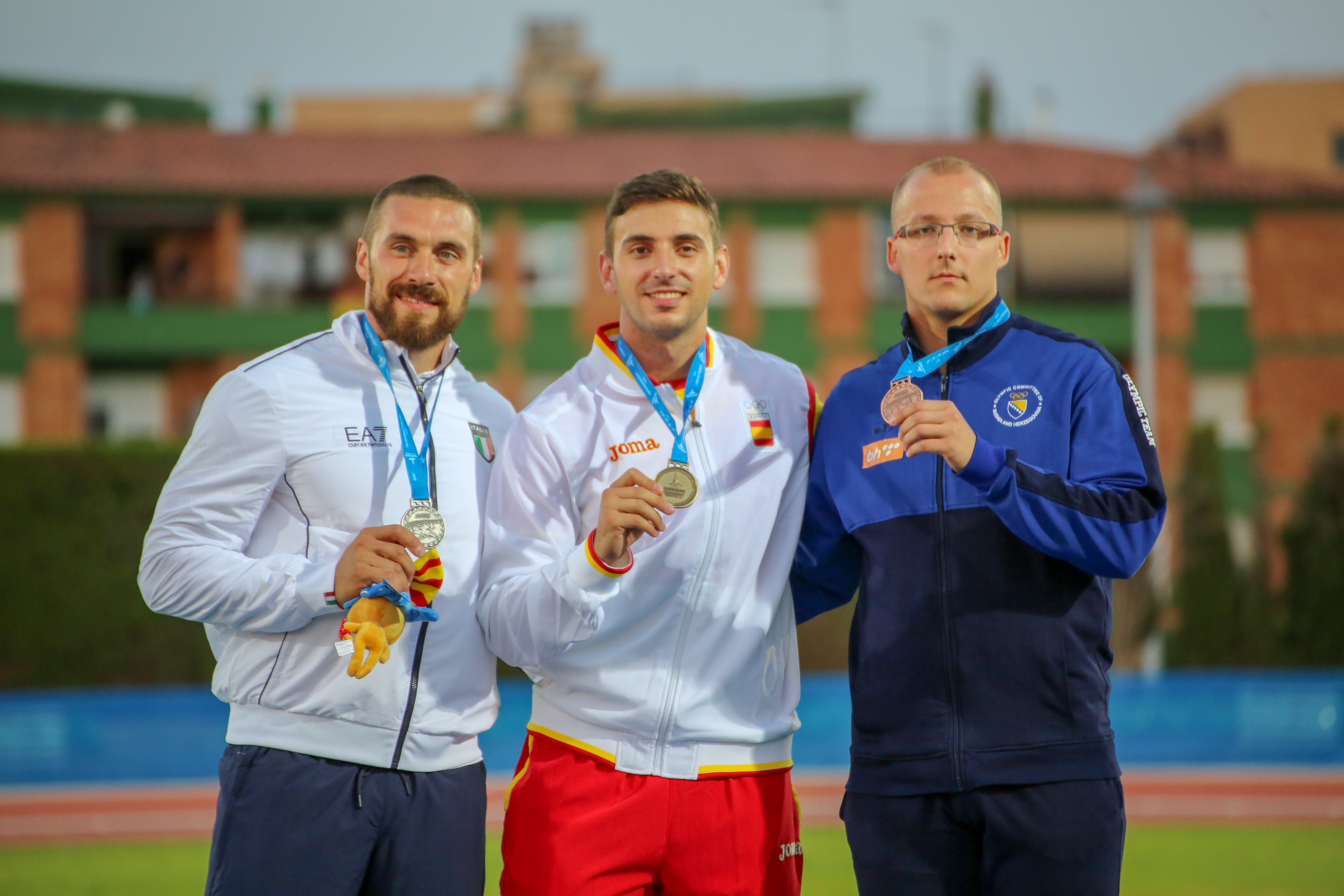 Medallistas en lanzamiento de jabalina en los Juegos del Mediterráneo 2018 (Roberto Bertolini, Nicolás Quijera y Dejan Mileusnić)